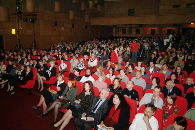 Moja fotografija.